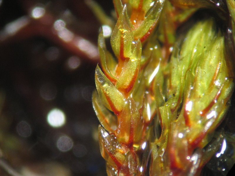 Gemeines Quellmoos (Philonotis fontana), Detailaufnahme (~30x)